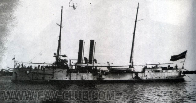 Фото крейсера "Маршал Сукре" (бывш. "Исла де Куба") источник: автор: неизвестен датировка: 1937